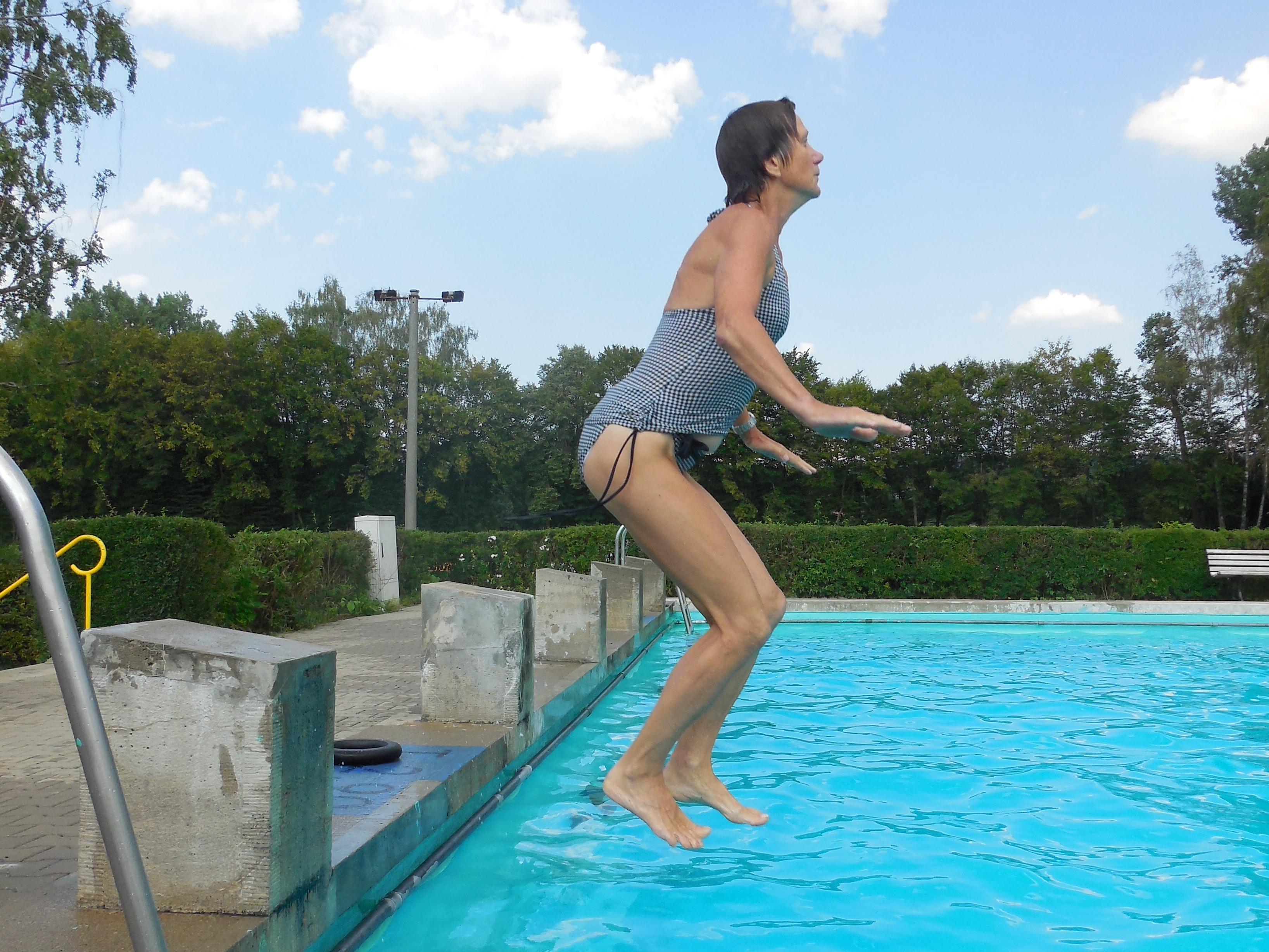 Sicherheitssprung zum Sprung in unbekanntes Gewässer, zum Retten einer gefährdeten Person. Mit den Füssen voraus und mit bremsenden Armen kann so bei zuwenig Wassertiefe Schaden abgewendet werden. Gezeigt von einer Ausbildnerin Rettungsschwimmen.